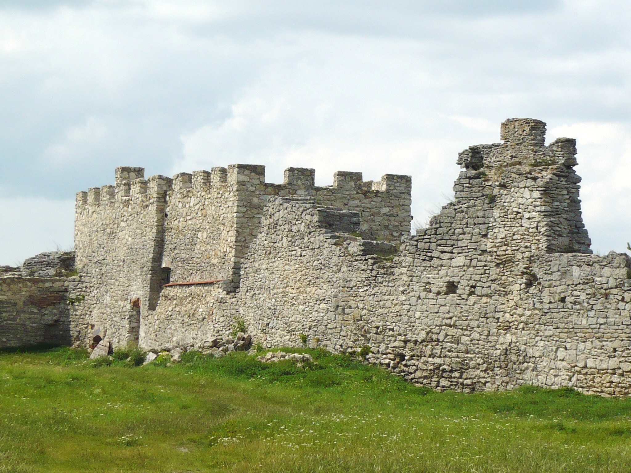 Zamek w Krzemieńcu